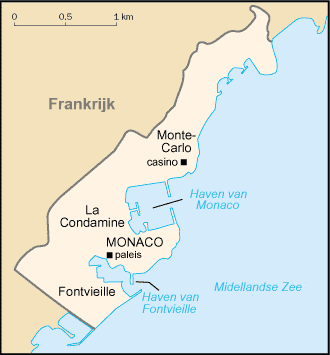 Nederlandse vertaling CIA-kaart